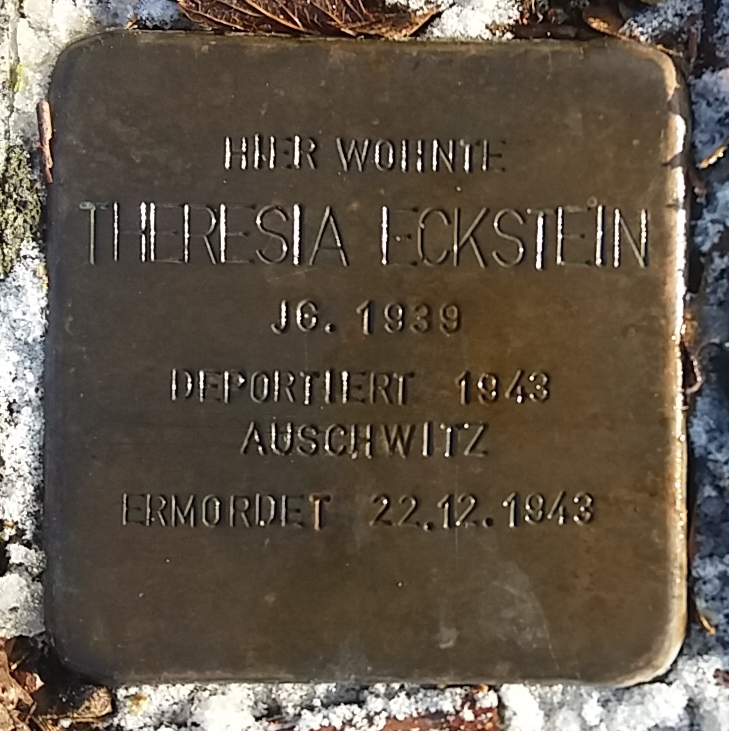 Stolperstein für Theresia Eckstein, Mitglied der Großfamilie Eckstein, Vöhringen (Iller)